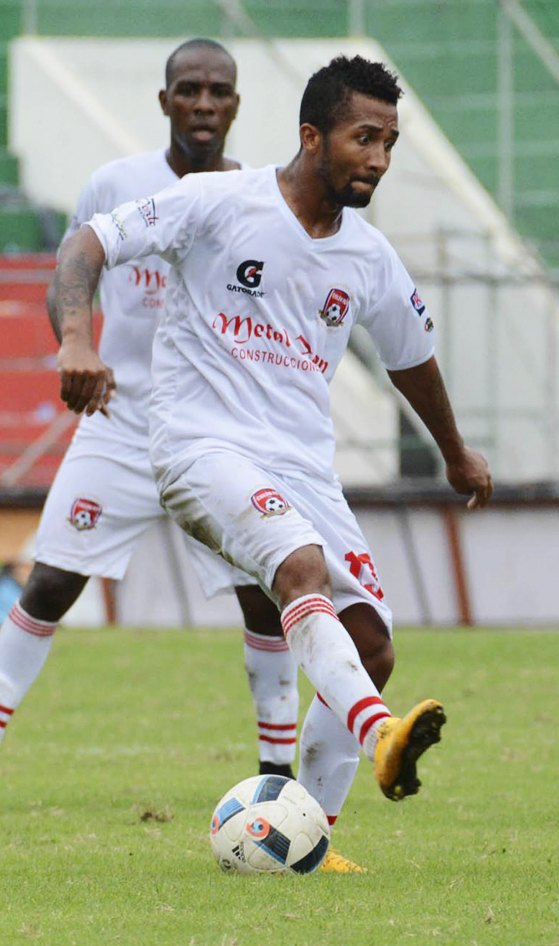 Byron Camacho jugando para el Colón FC en el 2016